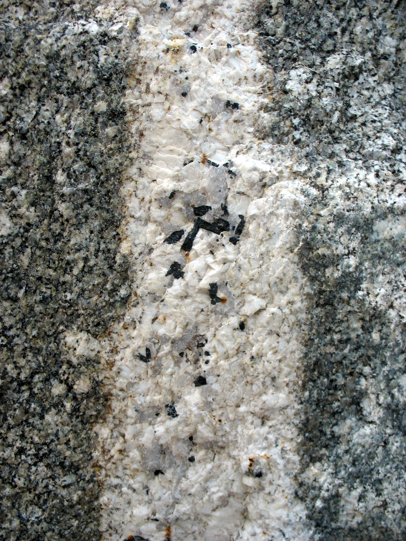 Dique de pegmatita en Robledo de Chavela, Madrid, España. Compuesto por cuarzo (banda de cristales blancos) y turmalina (cristales negros)